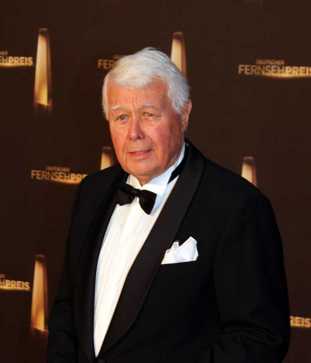 Peter Weck beim Deutschen Fernsehpreis 2012